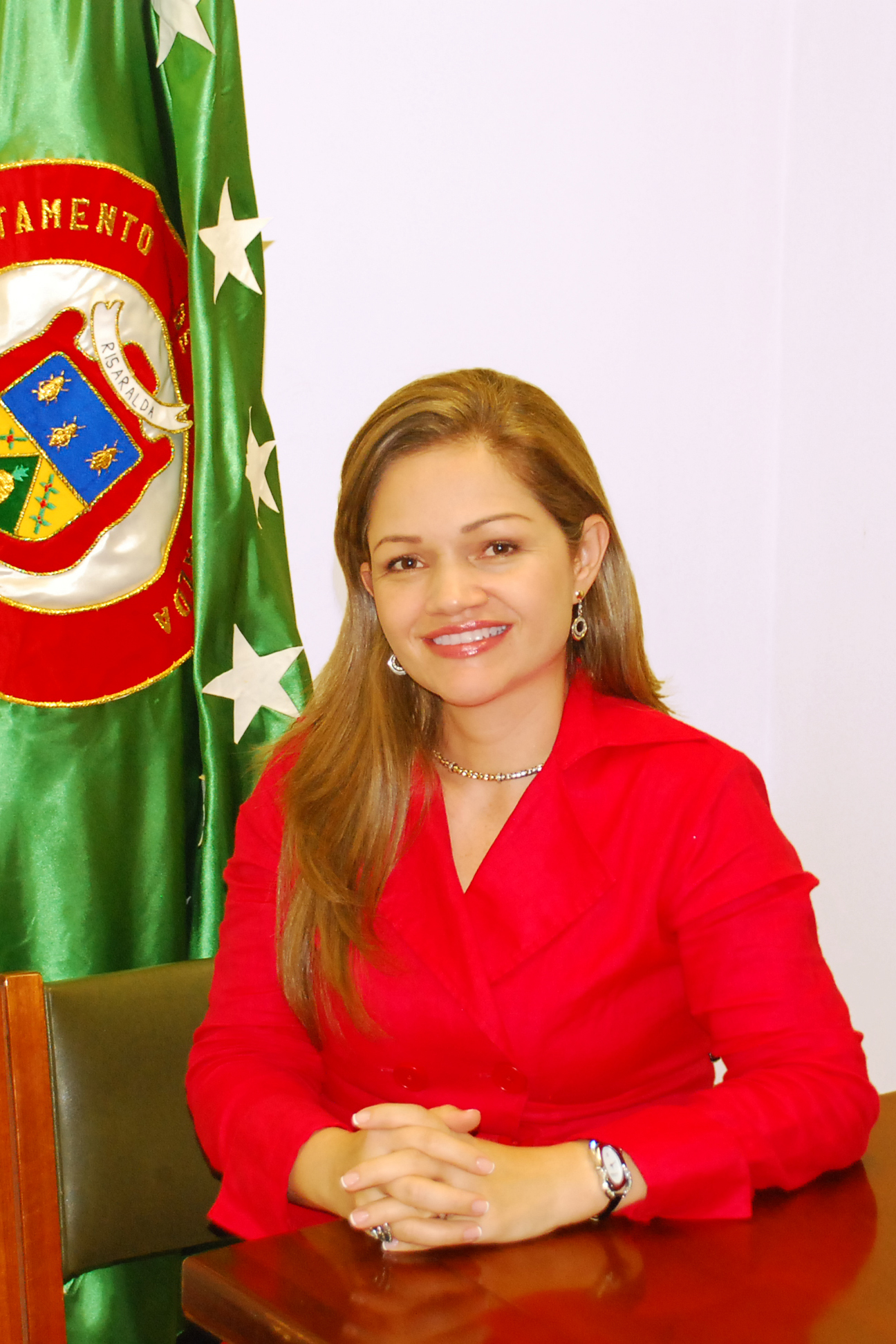 Esta foto Representa La Importante Campaña que realiza la Diputada Martha Cecilia Alzate como Candidata a la Gobernación de Risaralda por el Movimiento Político MIRA en el Año 2011, Haciendo enfasis en el Campo como la Mejor Opción de Progreso, así lo Indica en su Eslogan de Campaña "Cultivando Progreso", Ella nos realiza una pregunta Común pero que es Totalmente Real, ¿De que color es la Bandera de Risaralda? la Respuesta es: Verde, pero el Verde no representa las Esmeraldas sino el Color de Nuestra Tierra, El CAMPO.